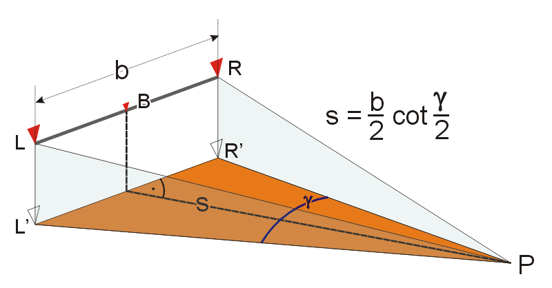 Prinzip der Bestimmung der Horizontalentfernung zwischen zwei Punkten B und P mittels Basislattenmessung. In P wird mit horizontiertem Theodoliten der Winkel (L'-R'-P) in der Horizontalebene durch Anzielen der Zielmarken L und R einer Basislatte gemessen. Dabei ist die Basislatte horizontiert und so auf den Punkt P ausgerichtet, dass die Basis b senkrecht auf der Vertikalebene durch die Horizontalentfernung s steht.